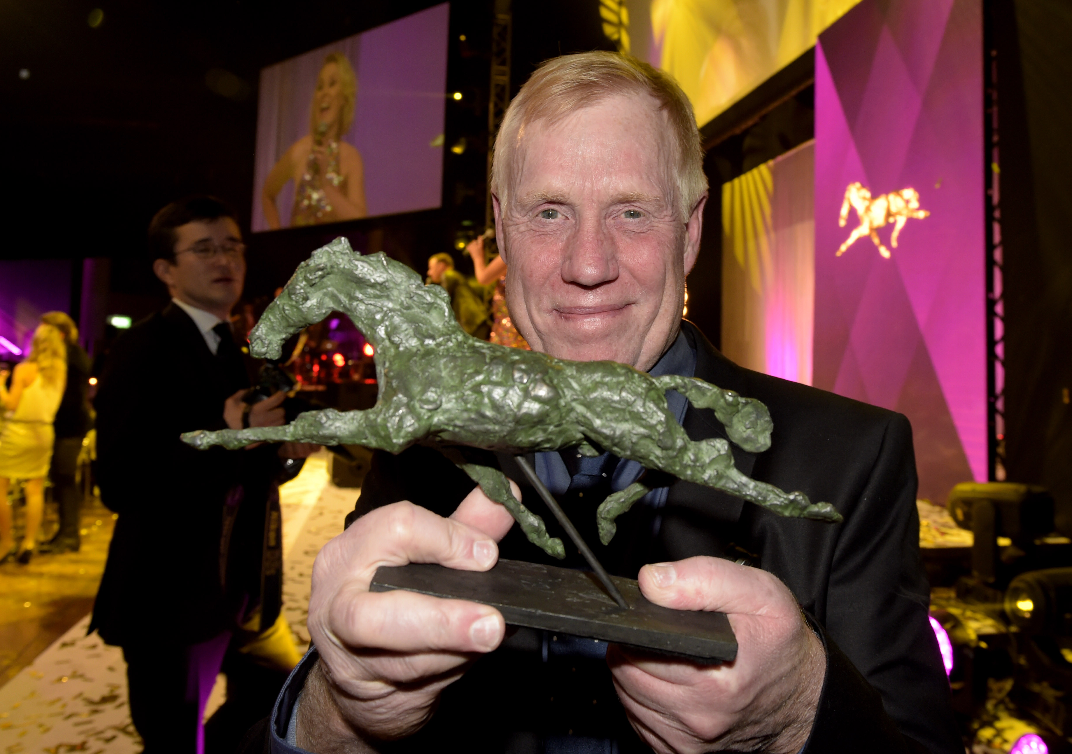 Stefan Melander efter att Nuncio blivit utsedd till Årets Häst 2016 vid Hästgalan i februari 2017. Foto: Lars Jakobsson/Kanal 75